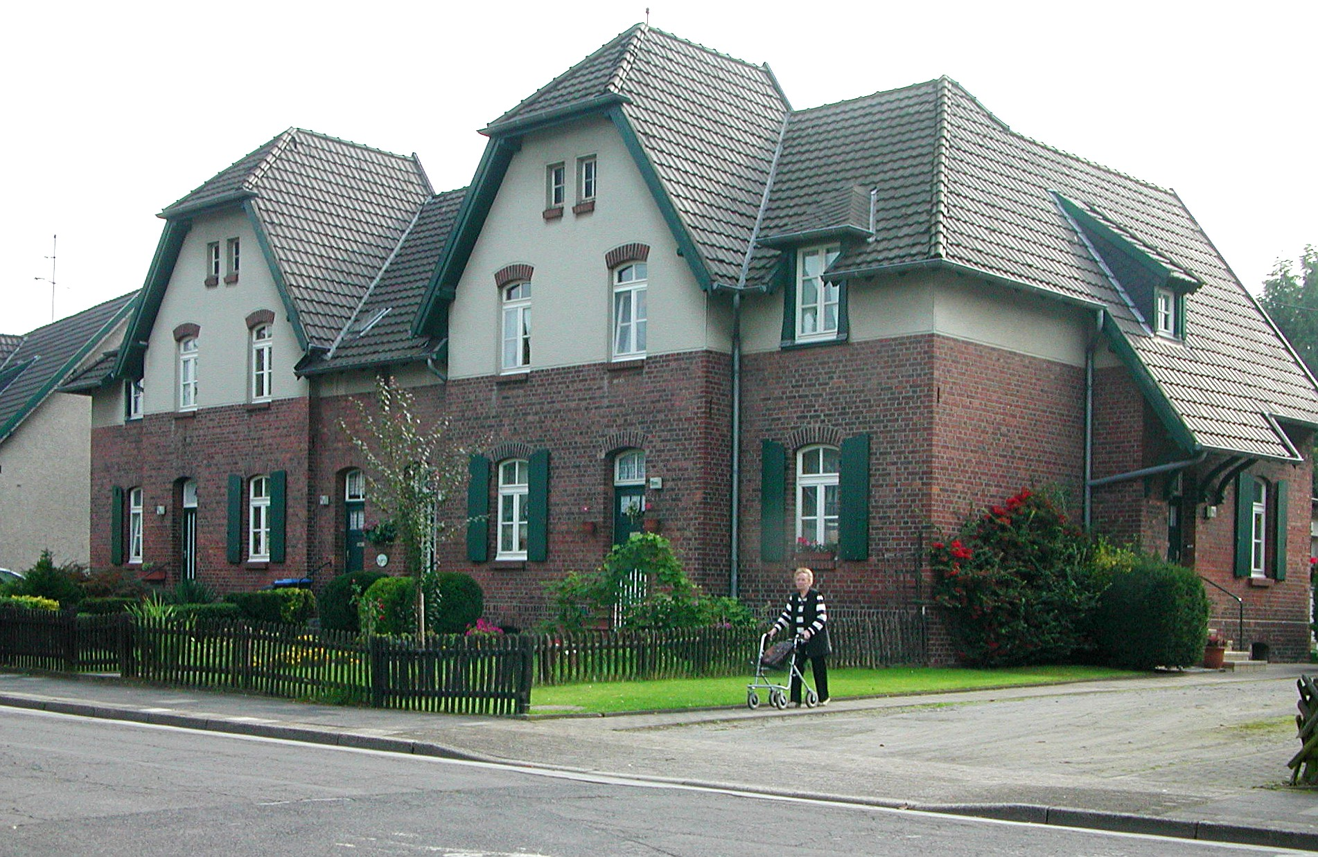 Bergarbeitersiedlung Meerbeck in Moers